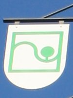 Walldorf, Baden-Württemberg: Wappenbaum an der Hauptstraße: Innungswappen der Gärtner